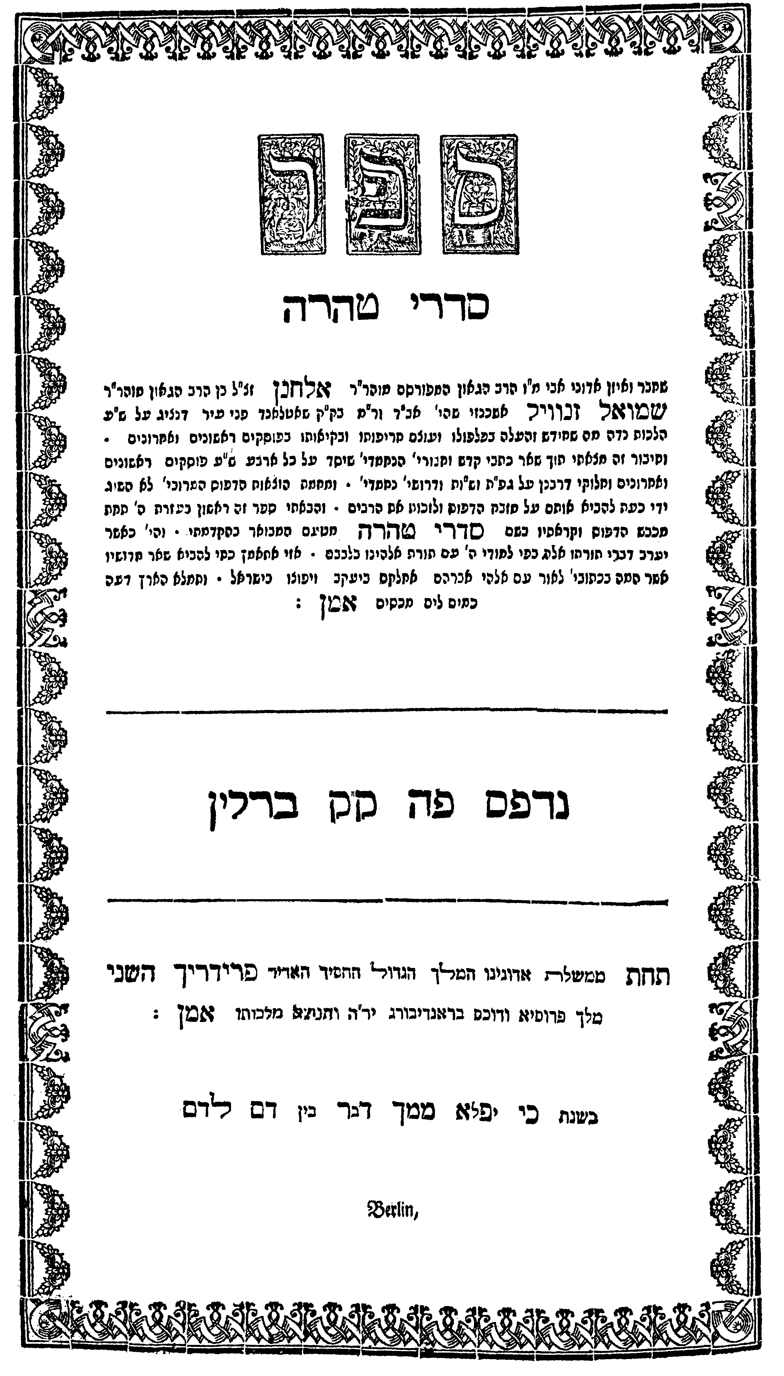 שער לספר 'סדרי טהרה', ברלין, תקלג